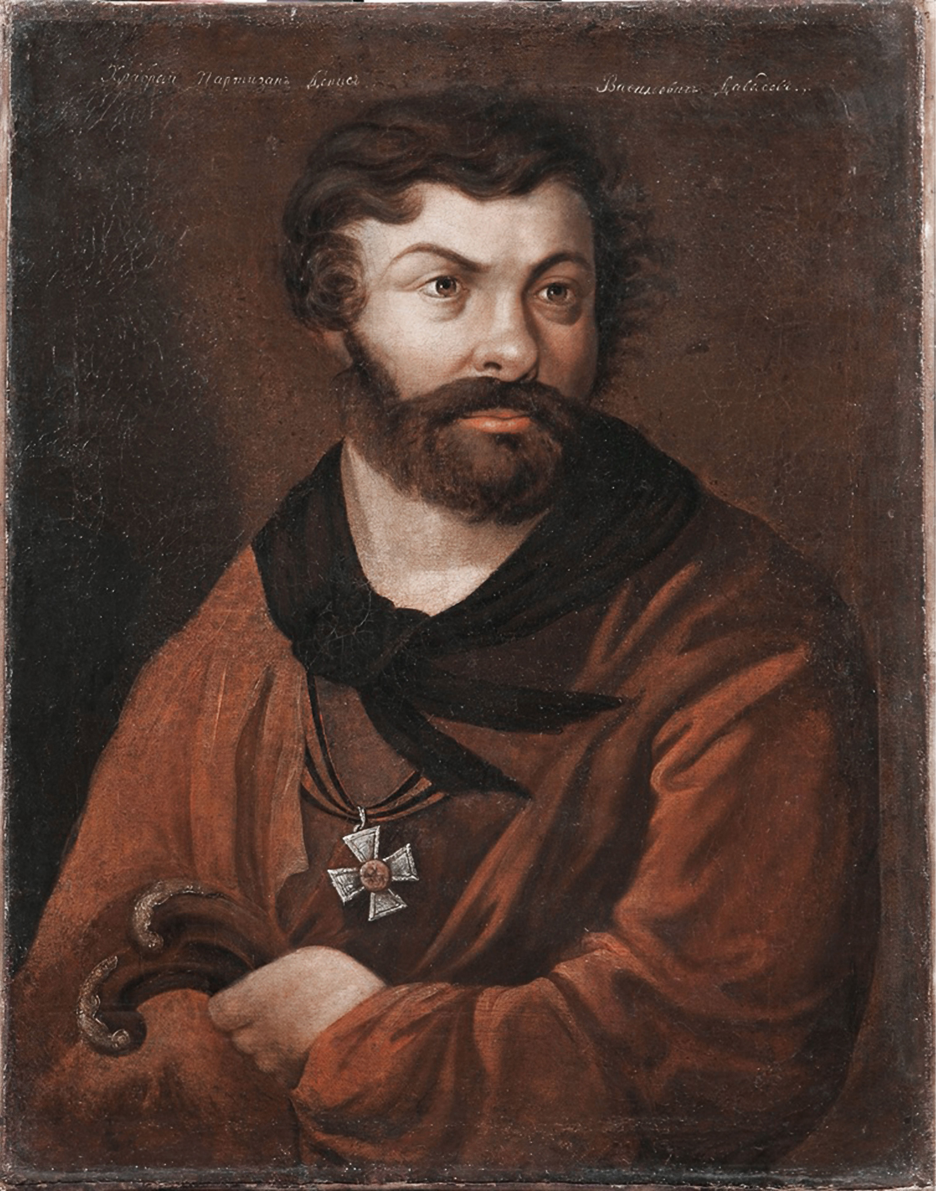 В.П. Лангер. Портрет Д.В. Давыдова. 1820-е гг. _______________ Знаменитый командир партизанского отряда Денис Давыдов на портрете представлен в крестьянской одежде, но с орденом Св. Георгия 4-го класса на шейной ленте. Известно, что Давыдов переодевался в крестьянскую одежду, чтобы не пугать местных жителей: не разбираясь в мундирах, те могли принять его за французского офицера.